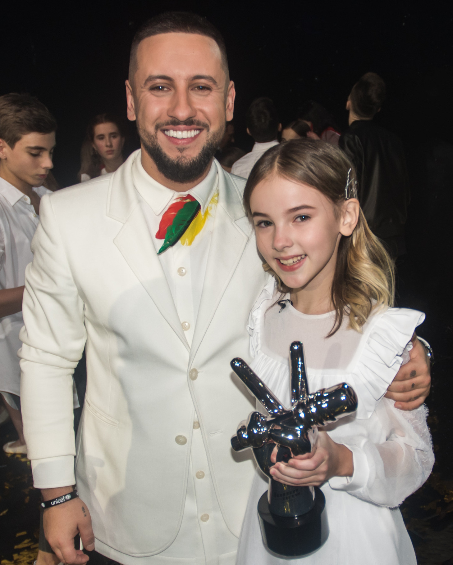 Финал Голос. Дiти 4. Monatik и Данэлия Тулешова